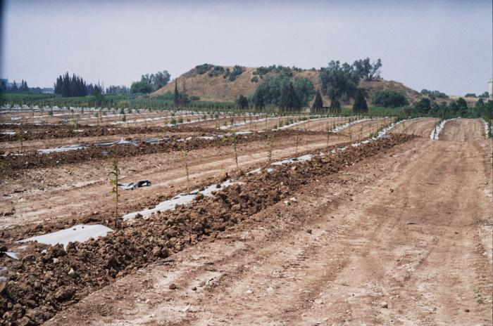 התל נמצא דרומית לקיבוץ, ושמו הארכיאולוגי הוא "תל עירני". בקריית גת מכנים אותו "הר גוליית". התל נמצא בין הקיבוץ לעיר, ומוקף בפרדסי הקיבוץ.